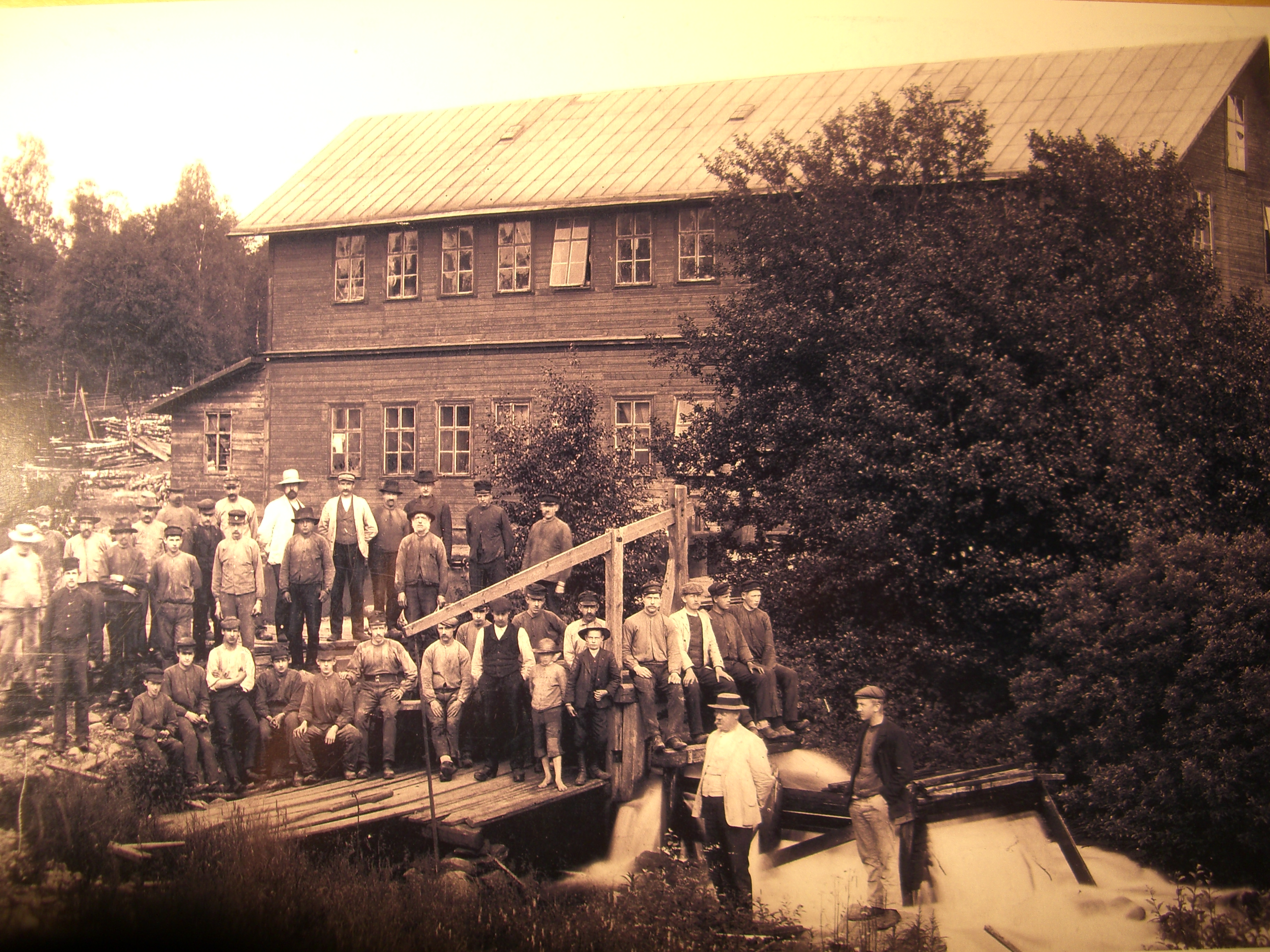 Hagafors nyuppförda stolfabrik 1906. Den äldsta fabriken förstördes i en brand 1895.